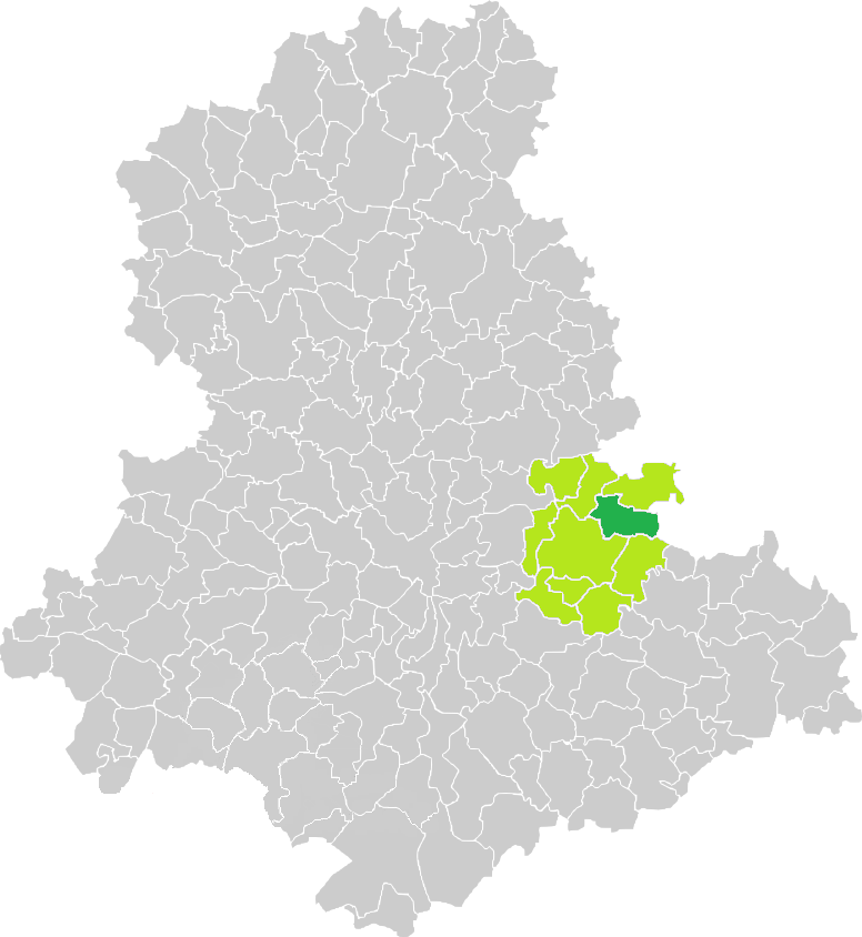 Carte de situation de la commune de Moissannes (en vert foncé) dans le votre Canton (en vert clair) sur une carte des communes de la Haute-Vienne